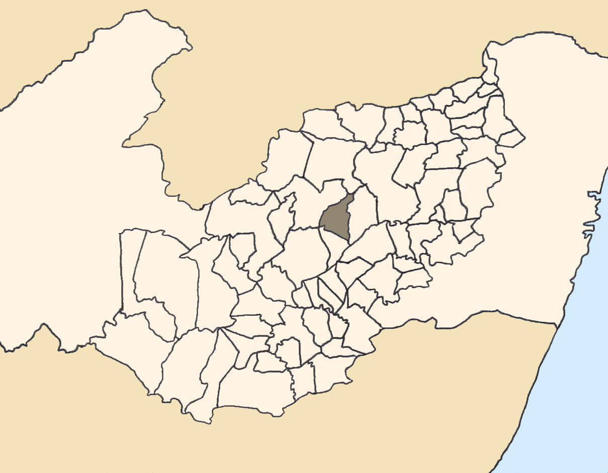 Mapa da mesorregião Agreste de Pernambuco (Brasil) subdivida em municípios. Em destaque, o município de Tacaimbó. Map of the brazilian state of Pernambuco (mesorregião Agreste) showing the city of Tacaimbó. Imagem tratada com o GIMP. Image made with GIMP.